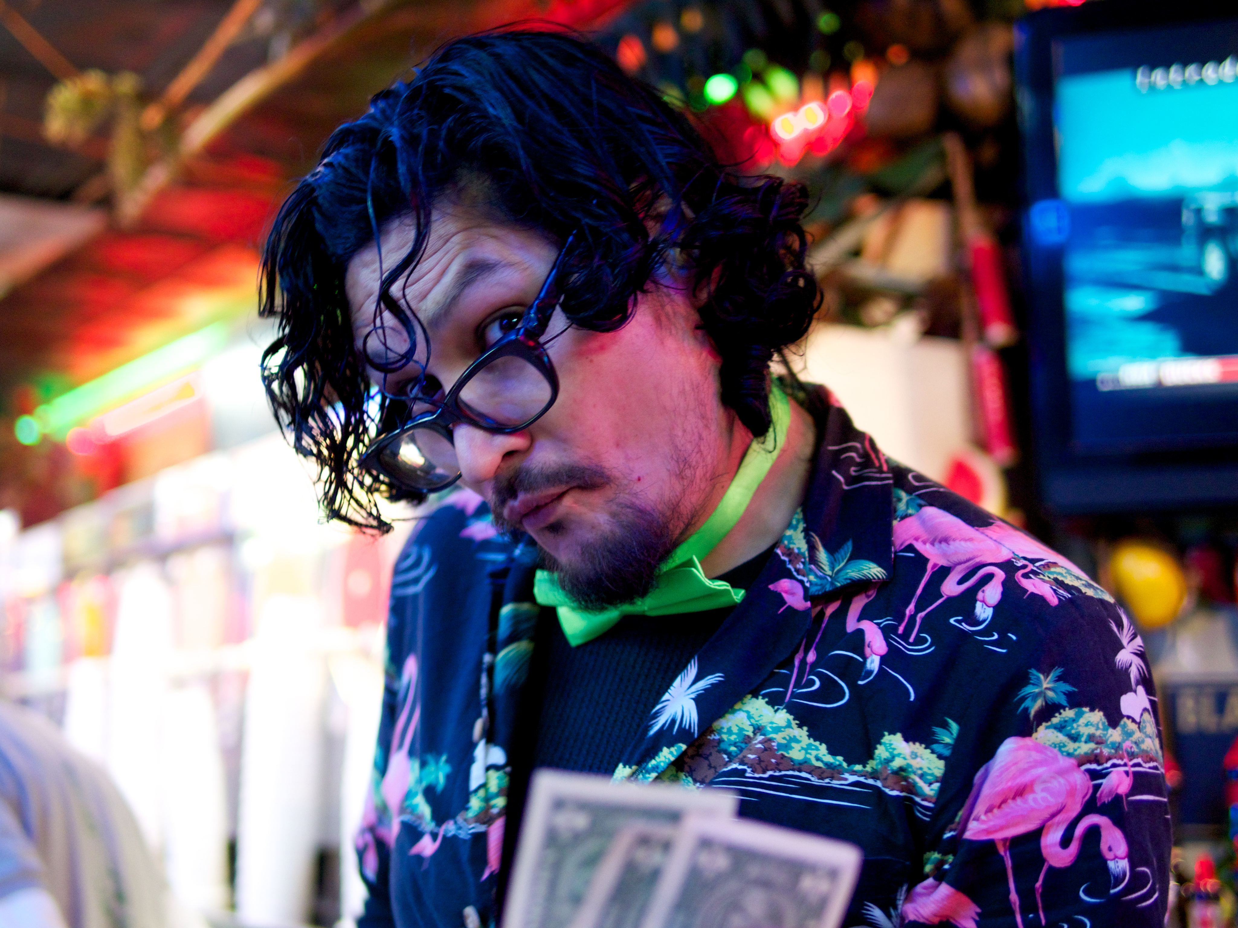 Bourbon Street Bar Tender, New Orleans. Taken during Super Bowl XLVII Weekend